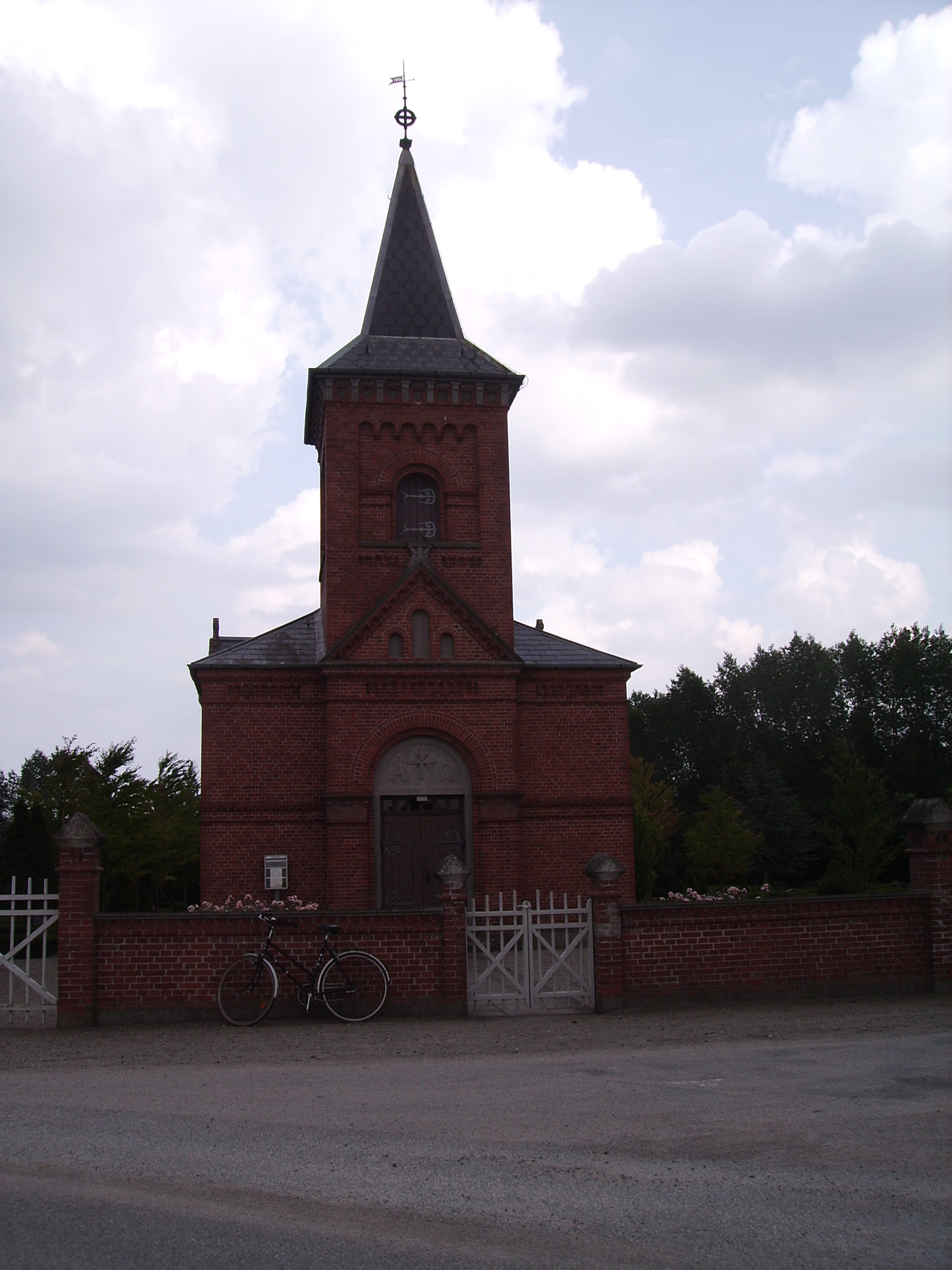 Hasmark Kirke, Norup Sogn, Lunde Herred, Odense Amt, Denmark (Danish Church) - Hasmark Kirke fra vest